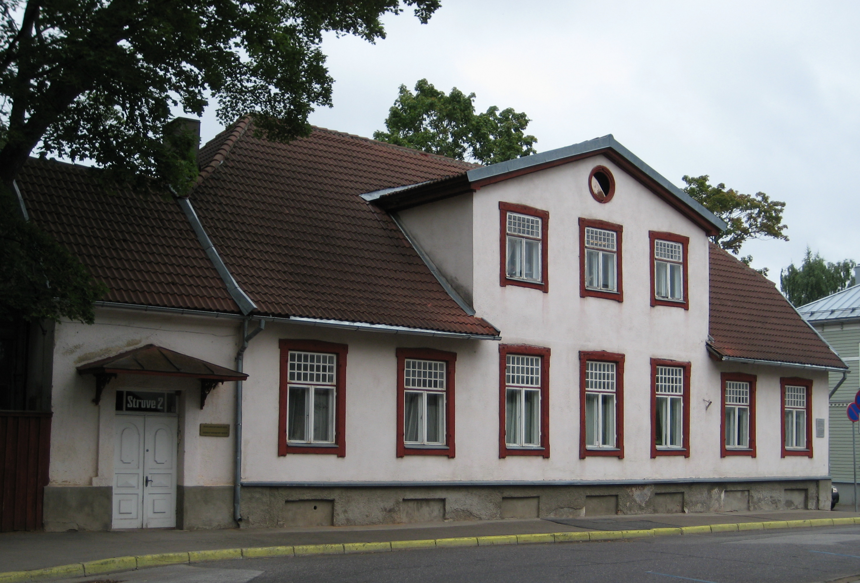 Eesti Looduseuurijate Seltsi maja Tartus Struve 2